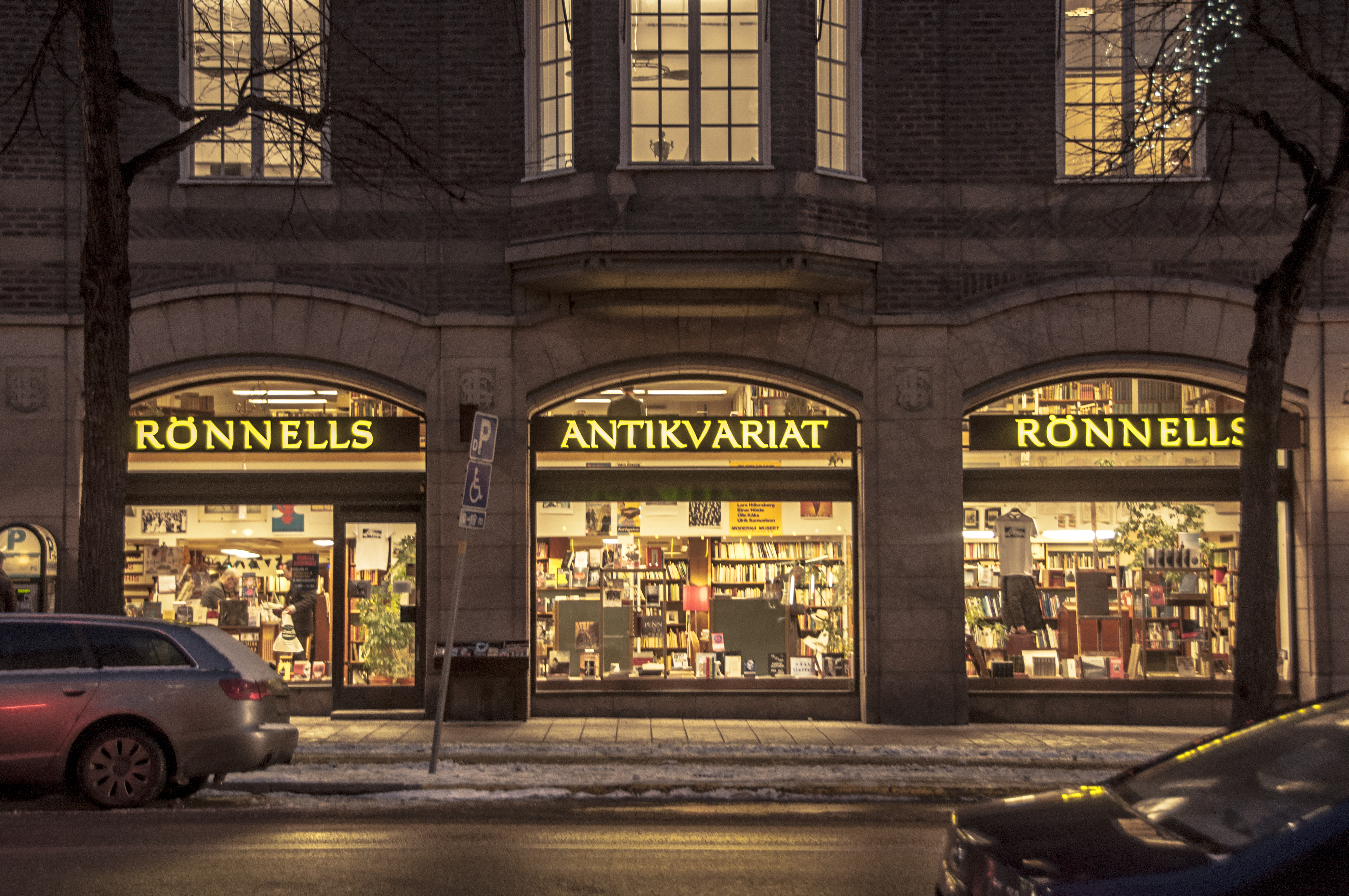 Rönnells anrikvariat